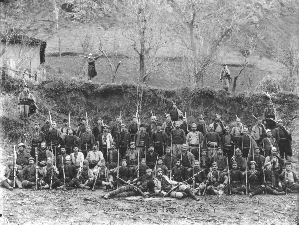 Gotse Nistorov's cheta, 1903